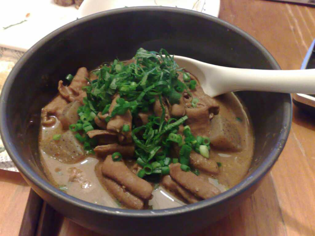 煮込み（群馬県渋川市上白井4477-1、津久田駅最寄りの「永井食堂」[1]）